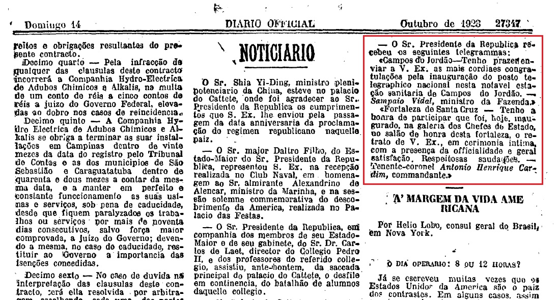 Pg. 43. Seção 1. Diário Oficial da União (DOU) de 14/10/1923 - Telegrama do, então, comandante da Fortaleza de Santa Cruz, Tenente Coronel Antônio Henrique Cardim ao Presidente da República.